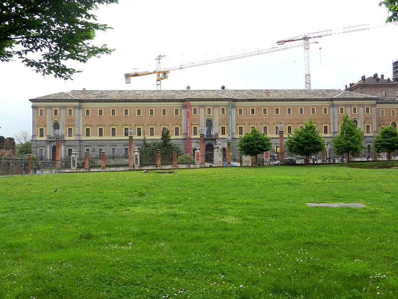 Torino - Galleria Sabauda (ospitata nella cosiddetta "manica nuova" di Palazzo Reale)